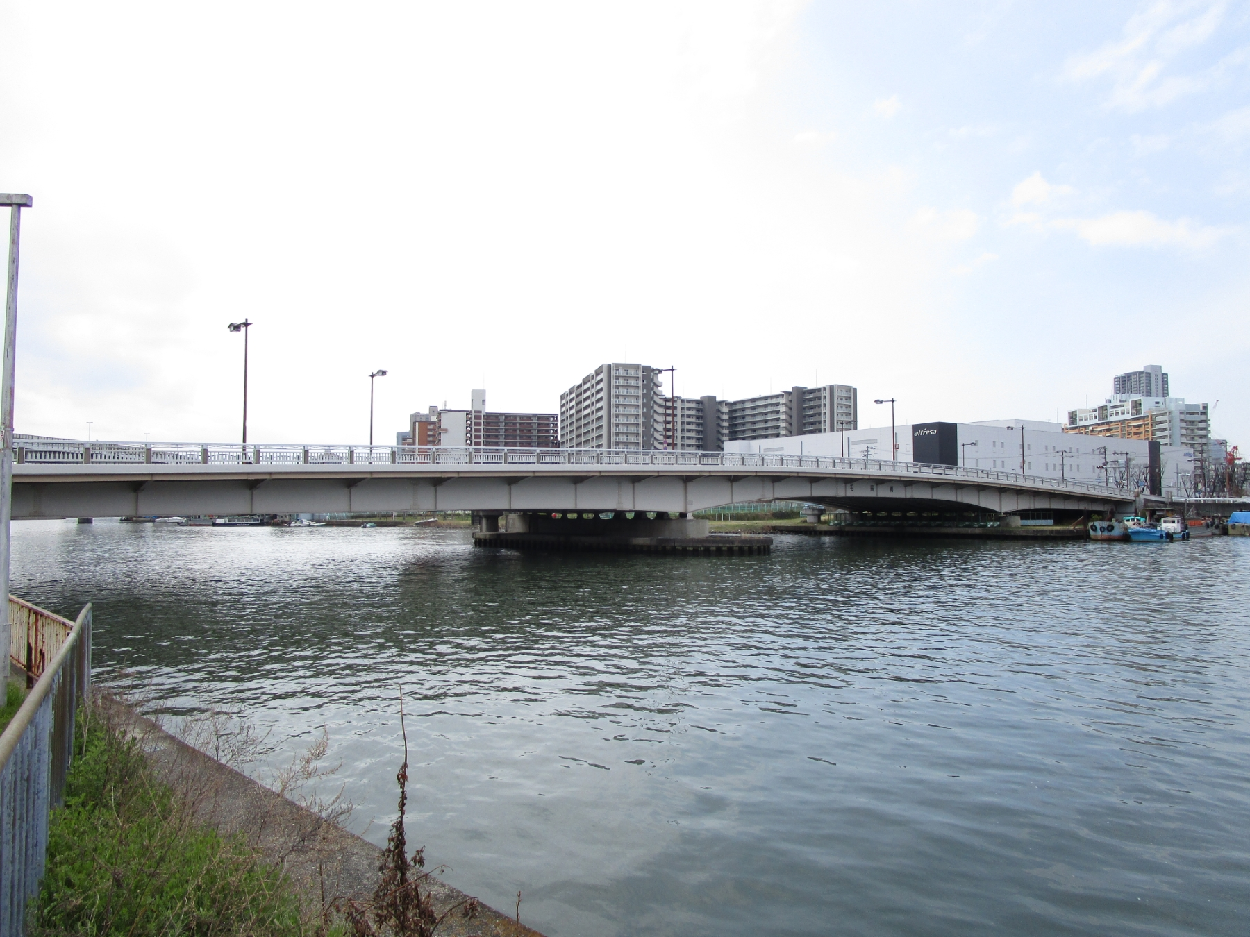 毛馬橋（蕪村公園より撮影）